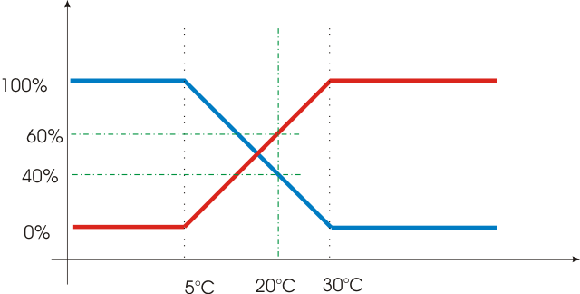 Fuzzy príklad 2